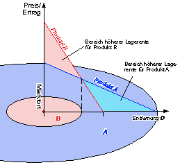 Thuenen Konkurrenz